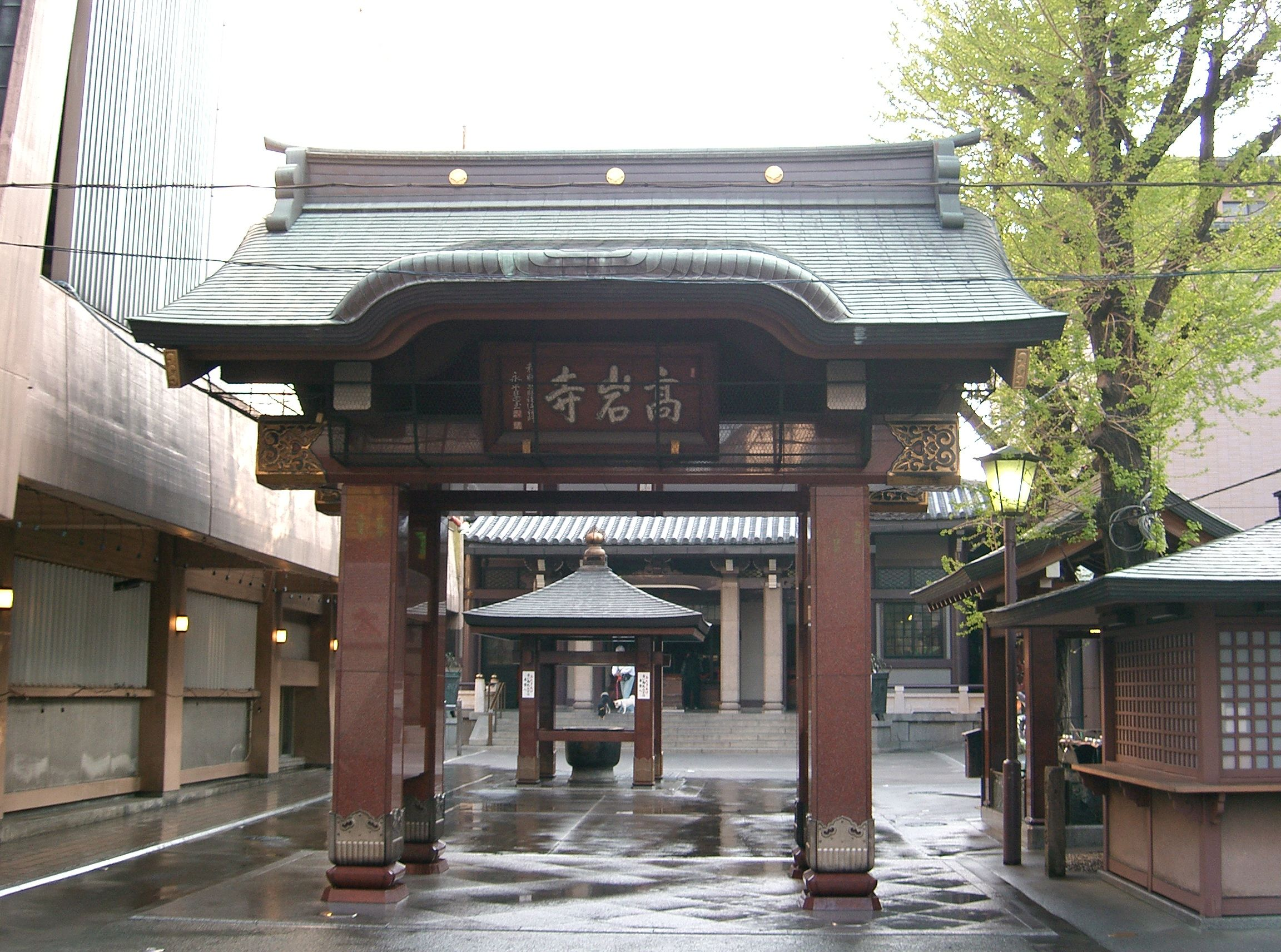 萬頂山 高岩寺